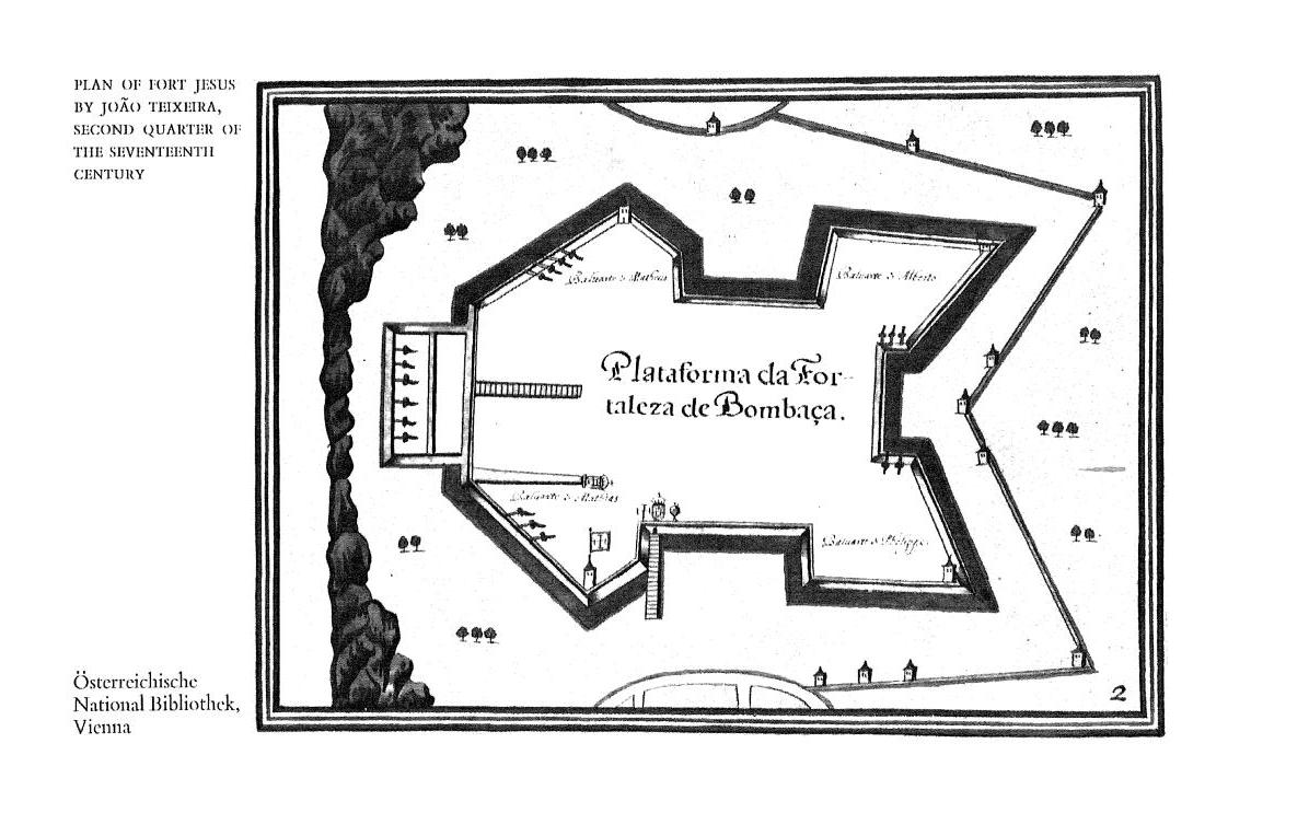 Plan de fort Jesus de Mombasa dressé au XVIIe siècle par le Portugais João Teixera